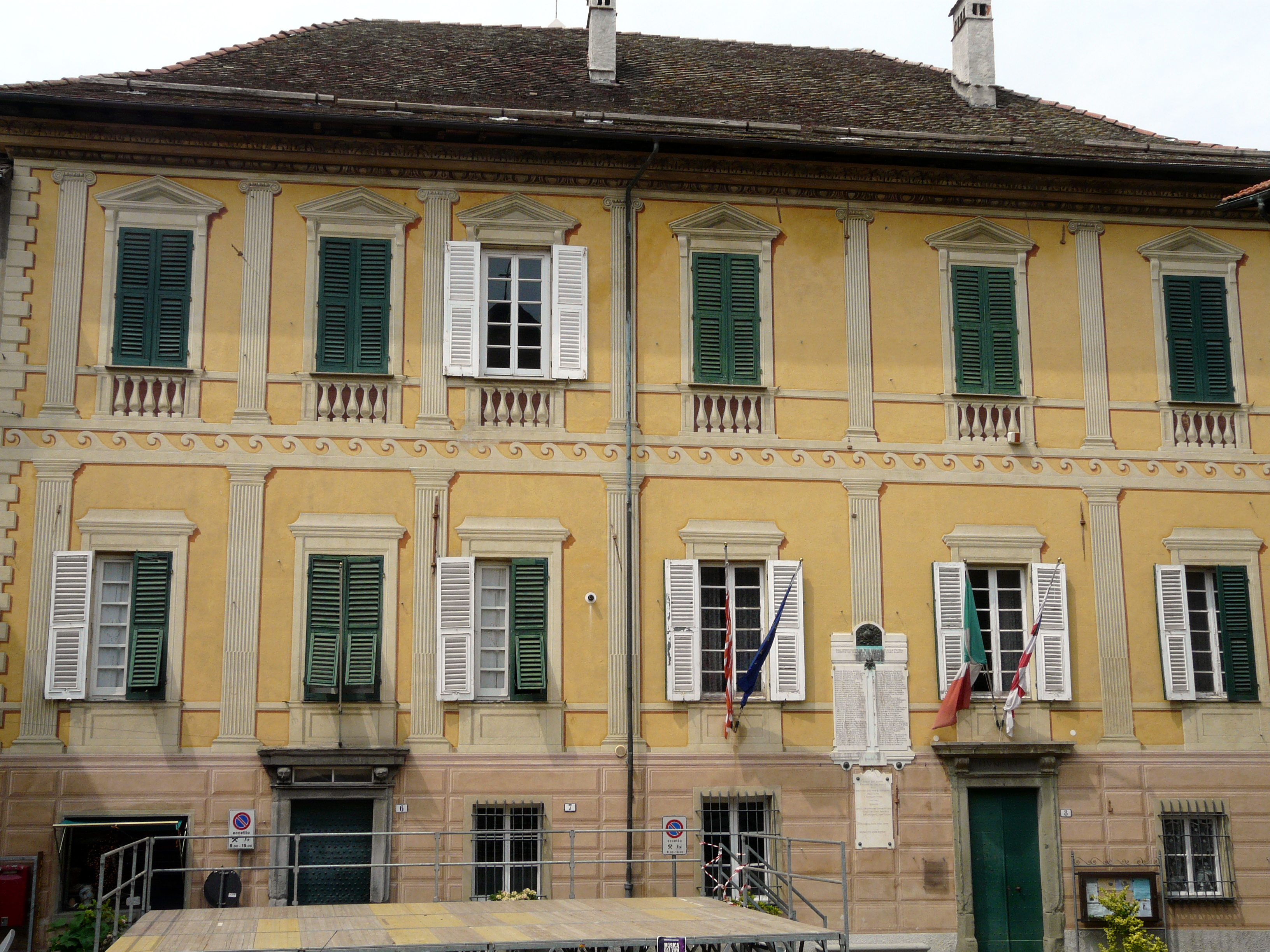 Palazzo del municipio, Sassello, Liguria, Italia